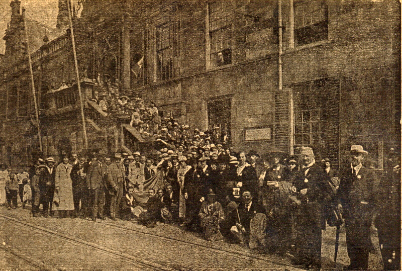 Ansichtskarte: Esperanto-ekskurso en Leiden de la XII. Hagaj kongresanoj, 13. aŭg. 1920. Ansichtskarte zum 12. Esperanto-Weltkongress (12a Universala Kongreso de Esperanto). Die Kongressteilnehmer bei einem Ausflug nach Leiden. Ungarische Ganzsache mit Wertaufdruck 10 Filler, hrsg. von Laquer, Budapest